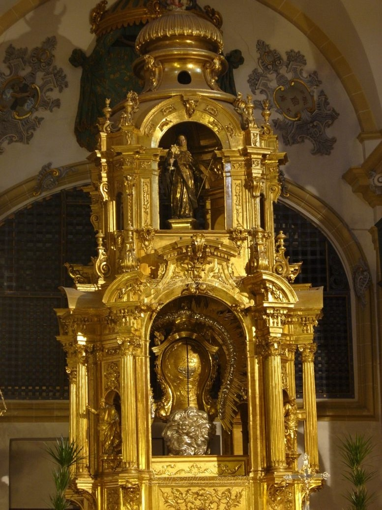 Baldaquino de la Iglesia del Monasterio de Santa Clara la Real (Murcia, España). De José Ganga Ripoll y Francisco Salzillo (1750).